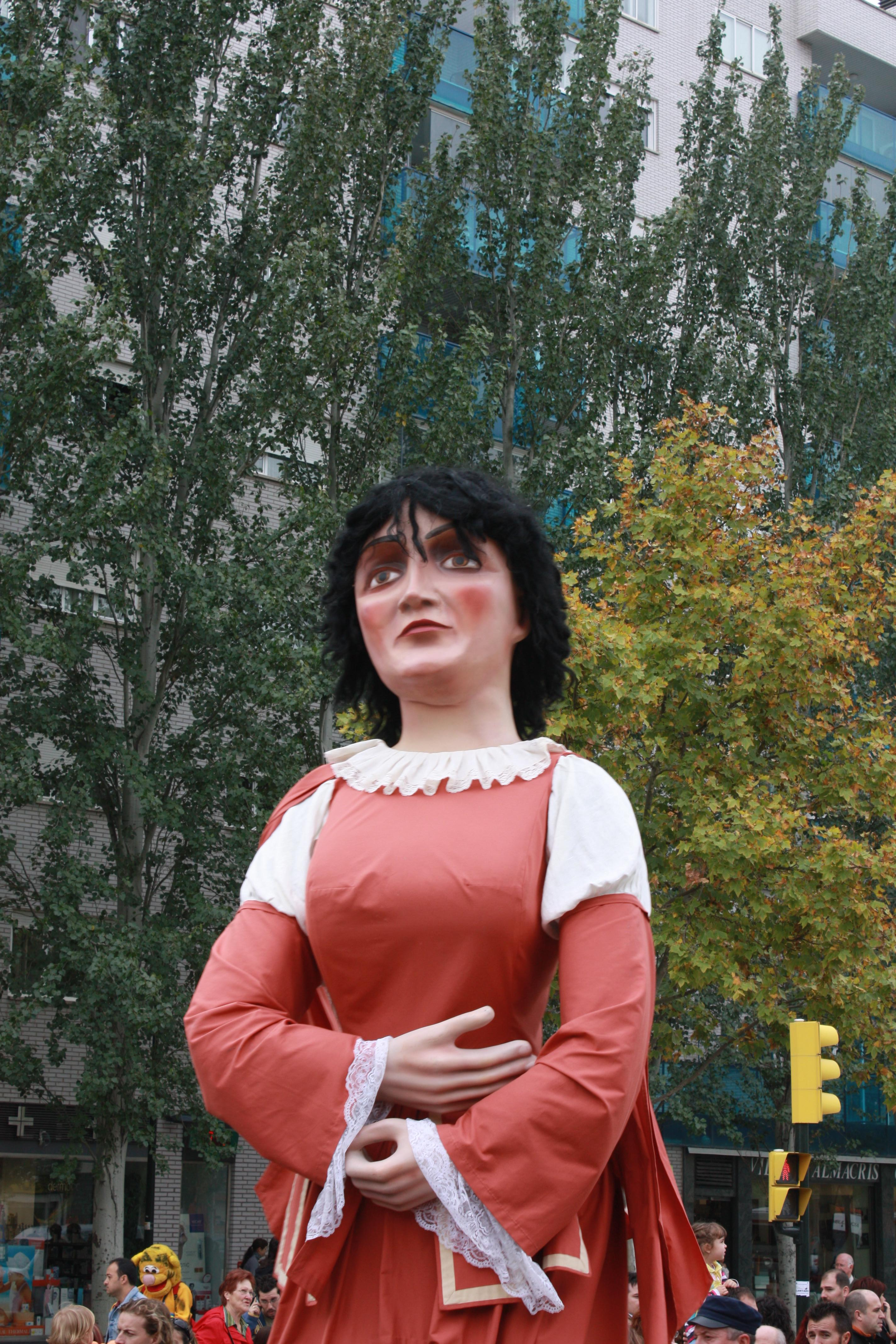 Gigantes, Dulcinea